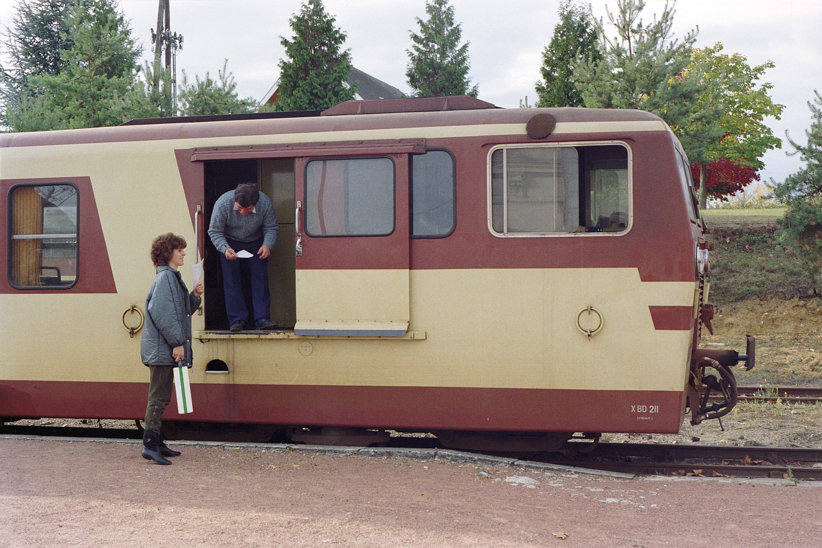 Arrêt en gare de Valençay pour l'autorail Verney X211 du chemin de fer du Blanc-Argent, le 14 octobre 1989.